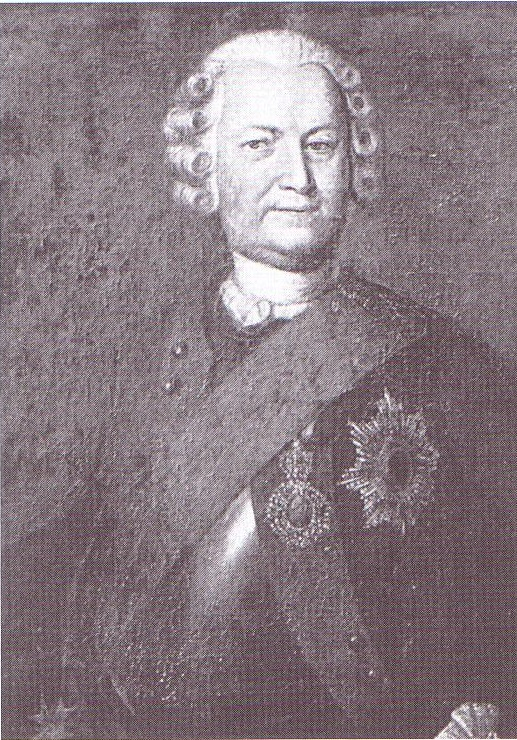 Portrait of Hans von Lehwaldt (1685-1768)